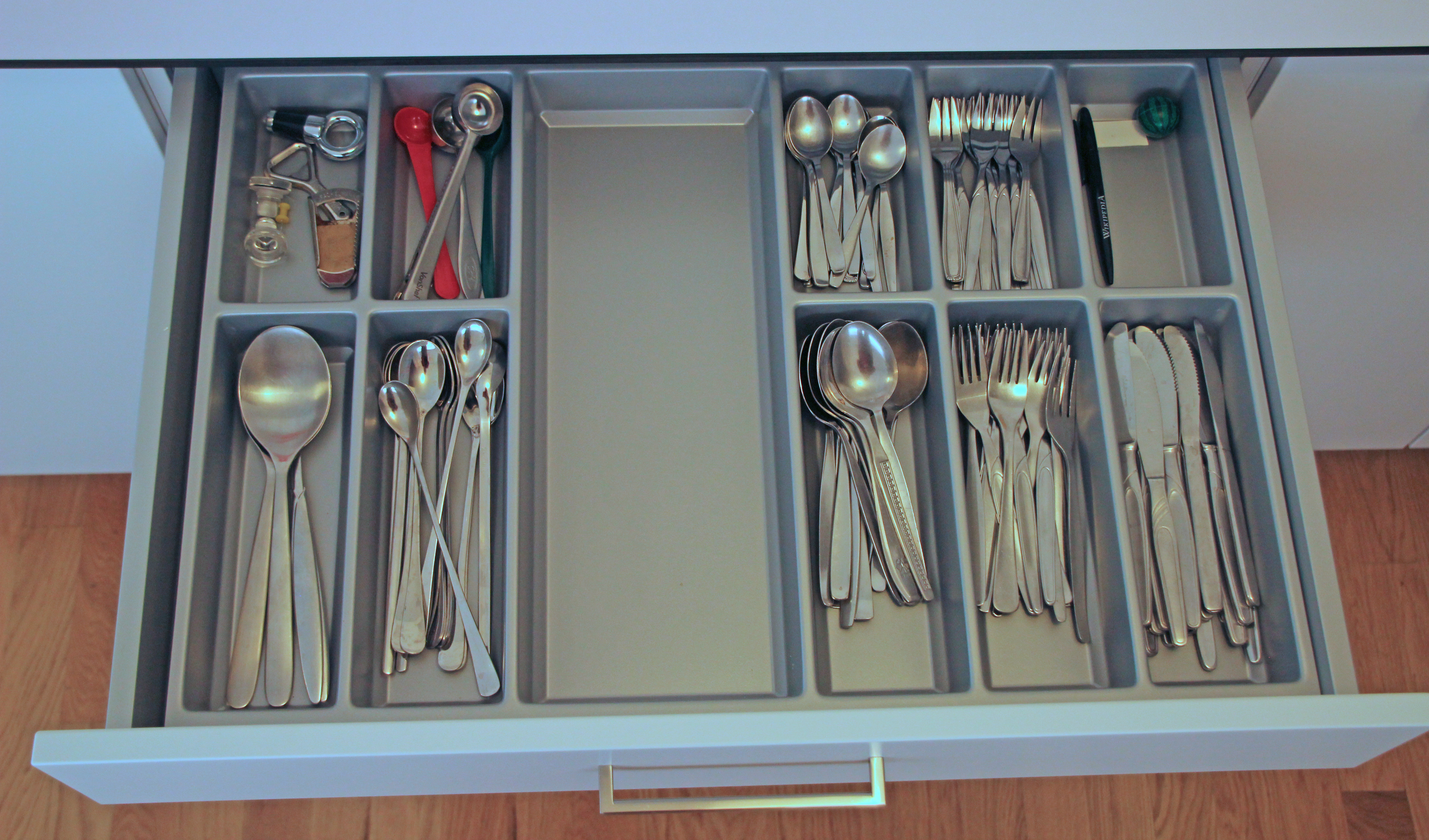 Bildinhalt: Offene Schublade mit Besteckkasten Aufnahmeort: Frankfurt am Main, Deutschland